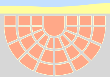 Modèle radio-concentrique en urbanisme